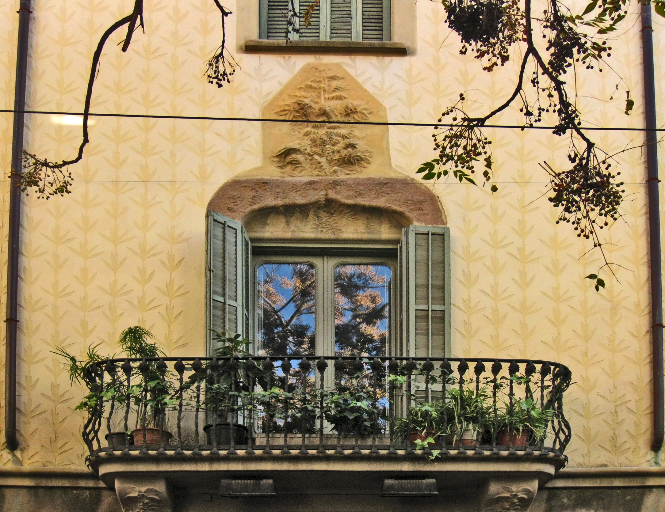 Casa Joan Barata, obra de Lluís Muncunill de 1905, al carrer de Sant Pere núm. 32-34 (Terrassa). Detall d'un balcó de la façana.